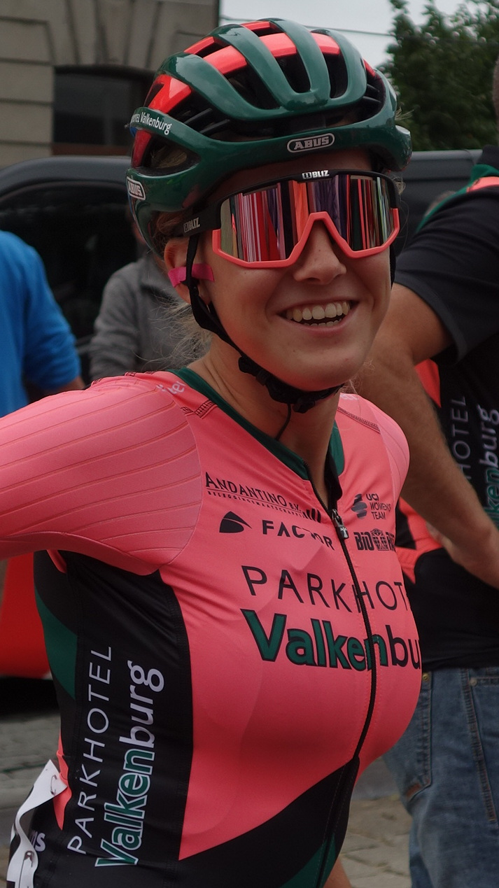 Start van de laatste etappe in Geraardsbergen van de Lotto Belgium Tour 2019